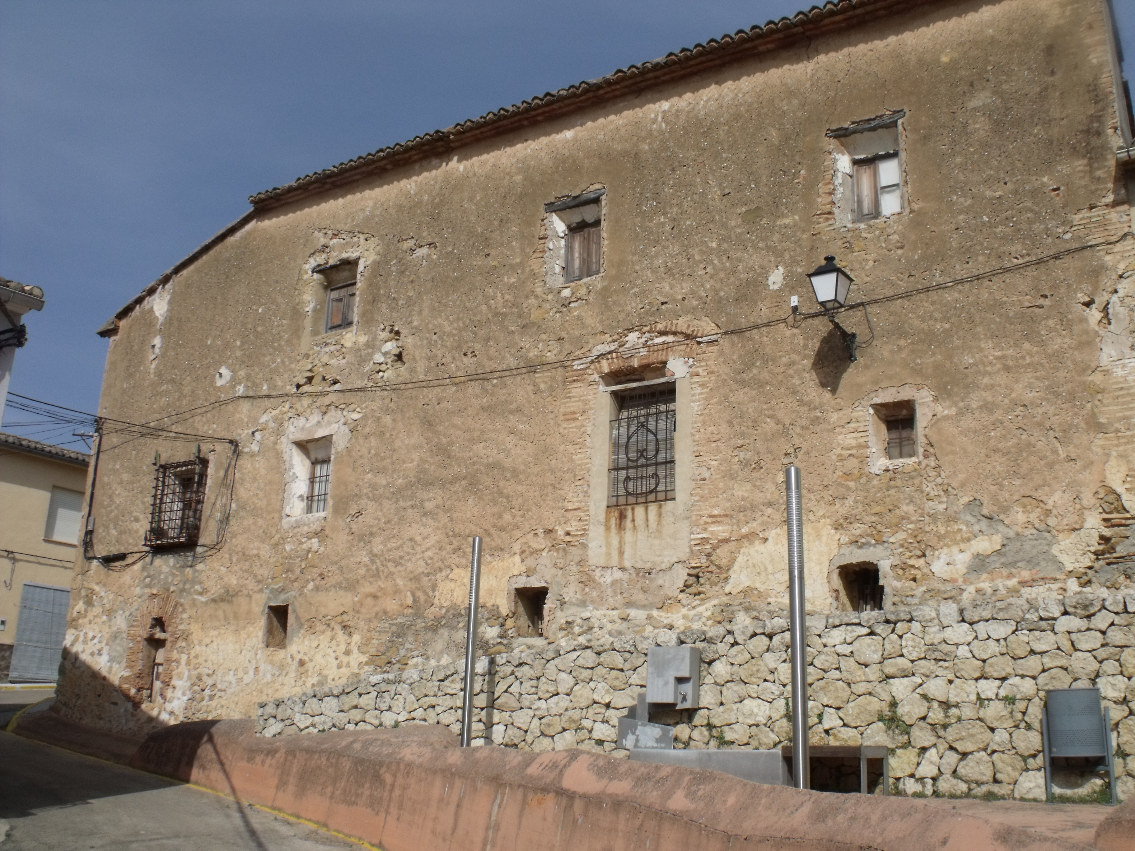 Rugat